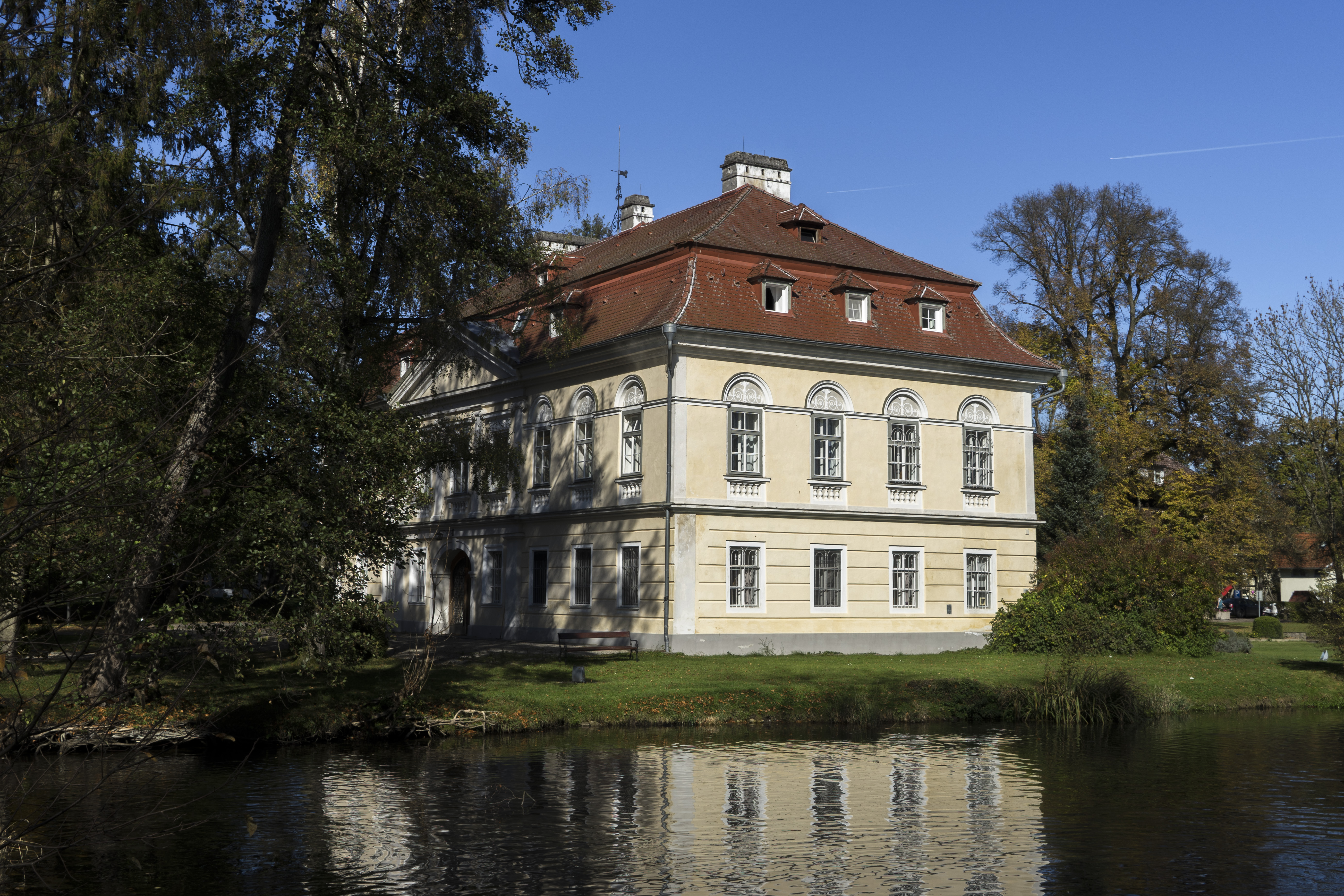 Schloss Bogenhofen